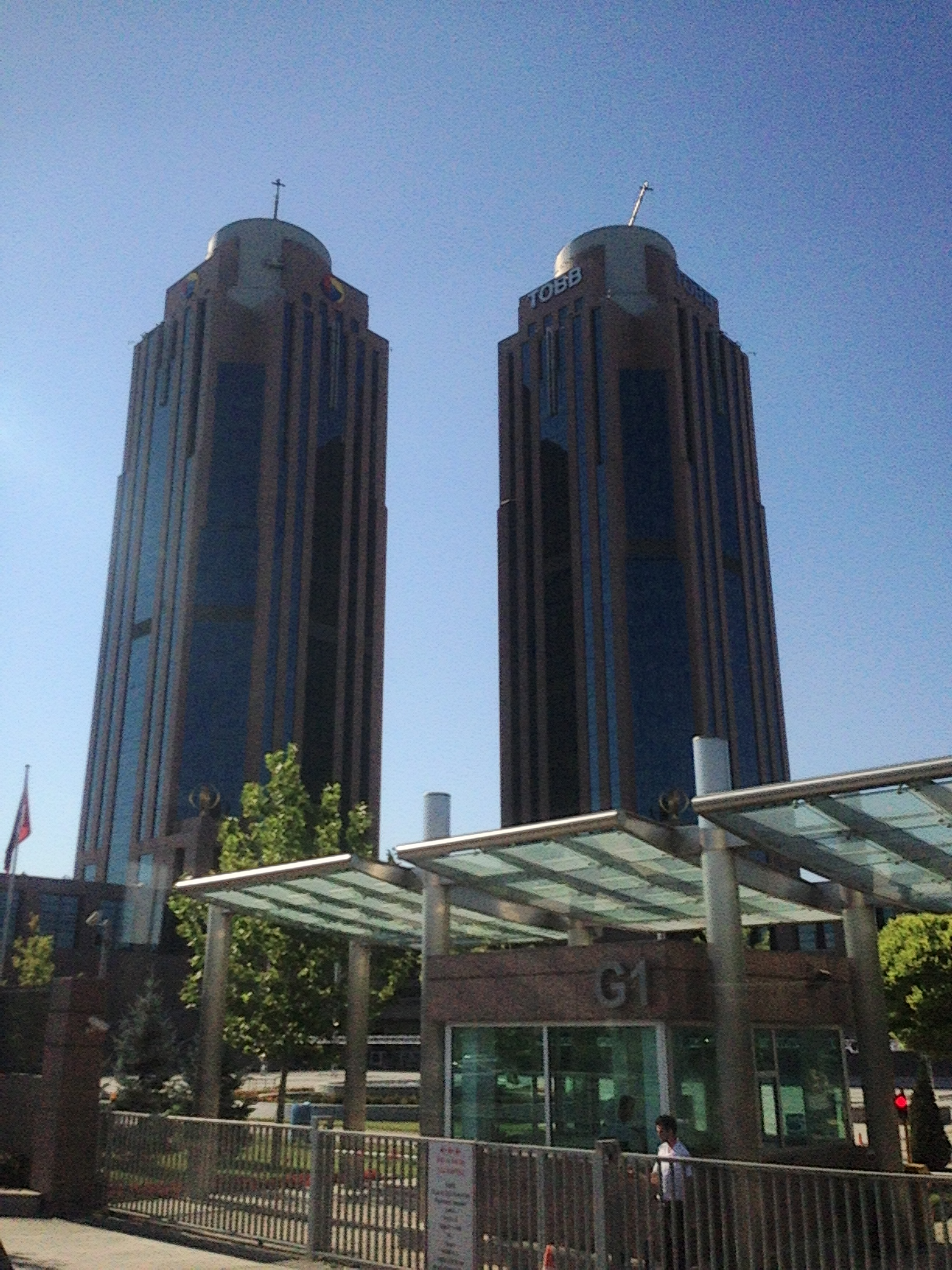 Ankara'da Türkiye Odalar ve Borsalar Birliği binası.